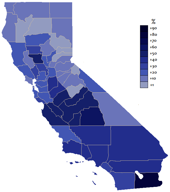 California español por condados